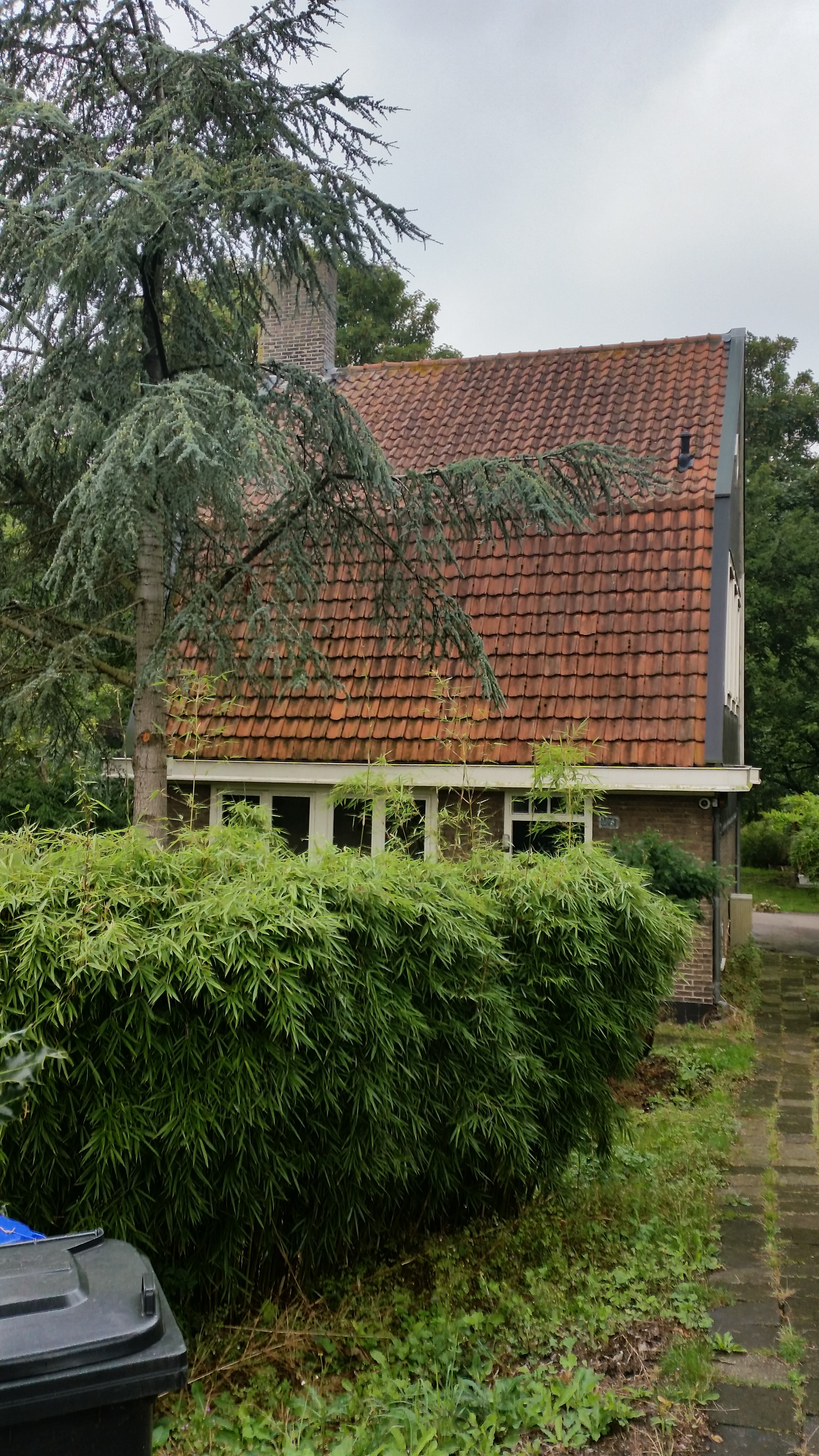 Machinistenwoning Gemaal Stadwijck